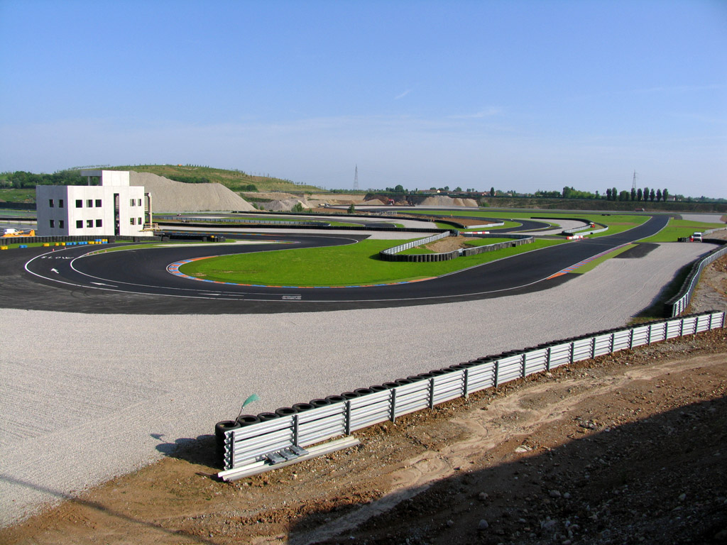 Autodromo di Franciacorta 05/08